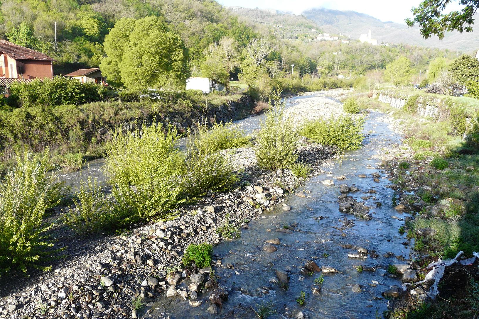 Stellanello, Liguria, Italia Torrente Merula, Stellanello, Liguria, Italia